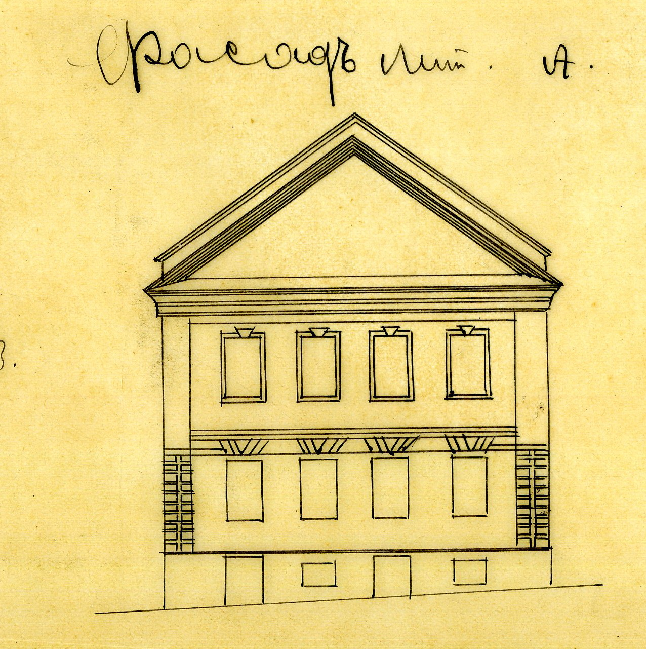 Беларуская (тарашкевіца): Менск (Miensk), вуліца Койданаўская (vulica Kojdanaŭskaja). Дом Вэндарфа (Vendarf)